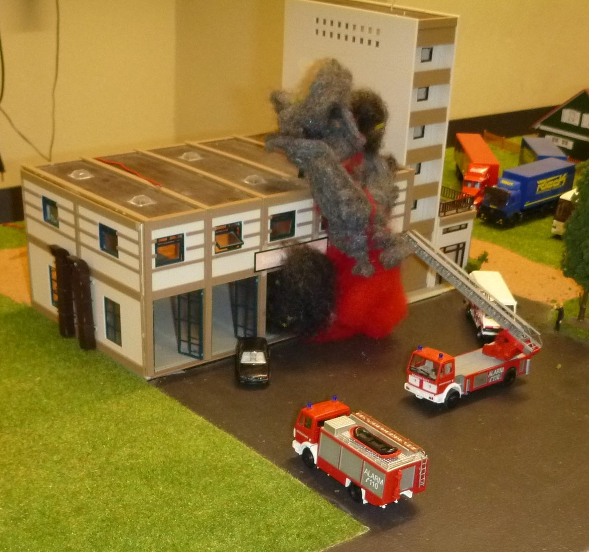 Brann på Smalvik brannstasjon